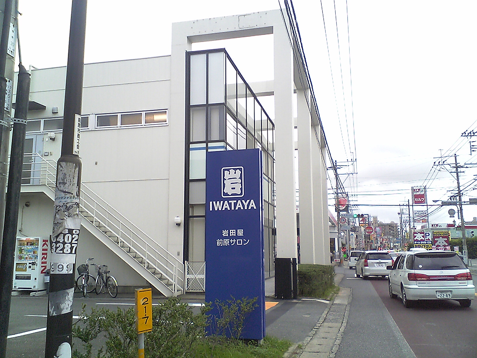 福岡県糸島市の岩田屋前原サロン